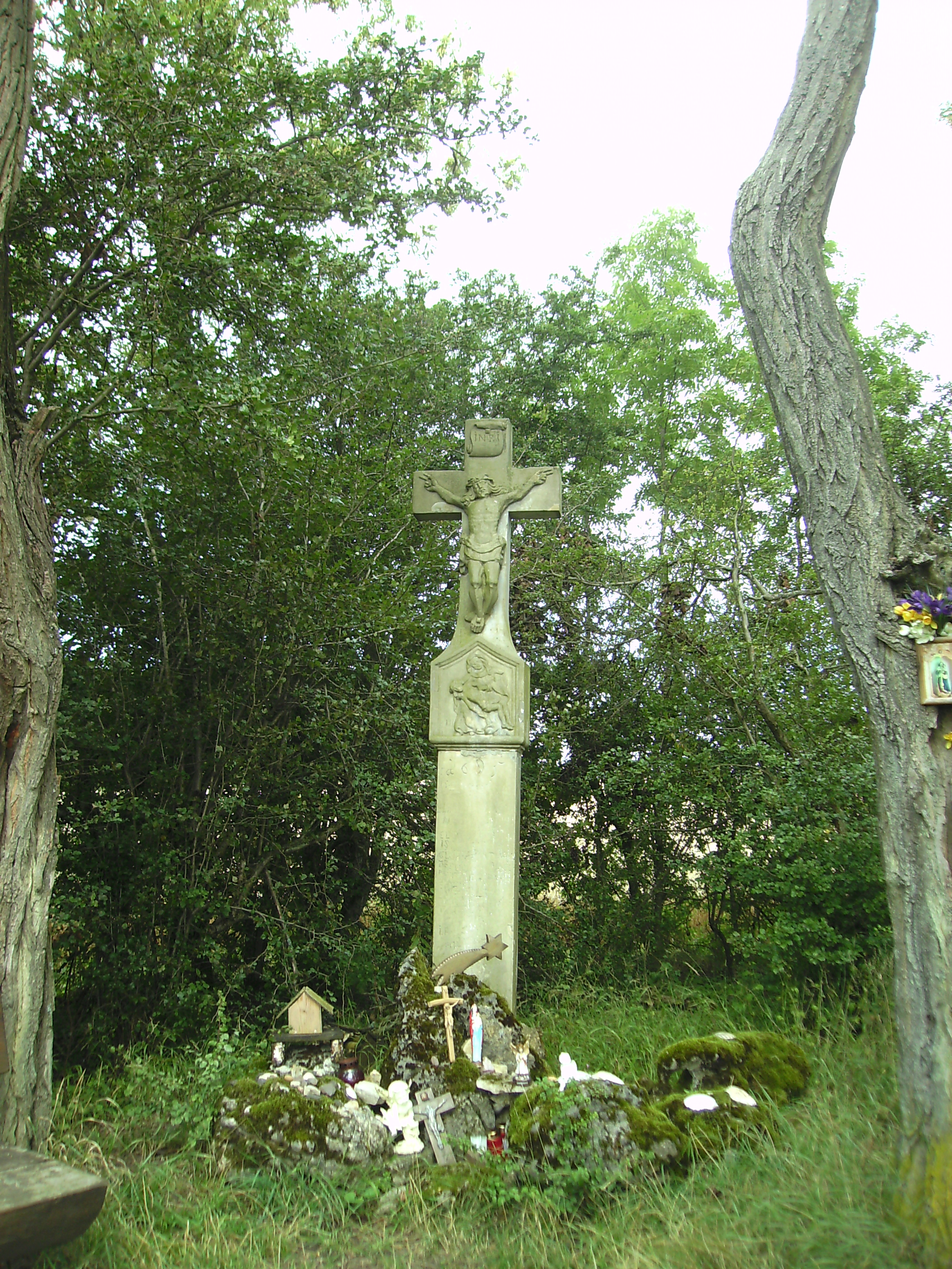 Altes Wegekreuz in Brudermannsfeld bei Bebelsheim